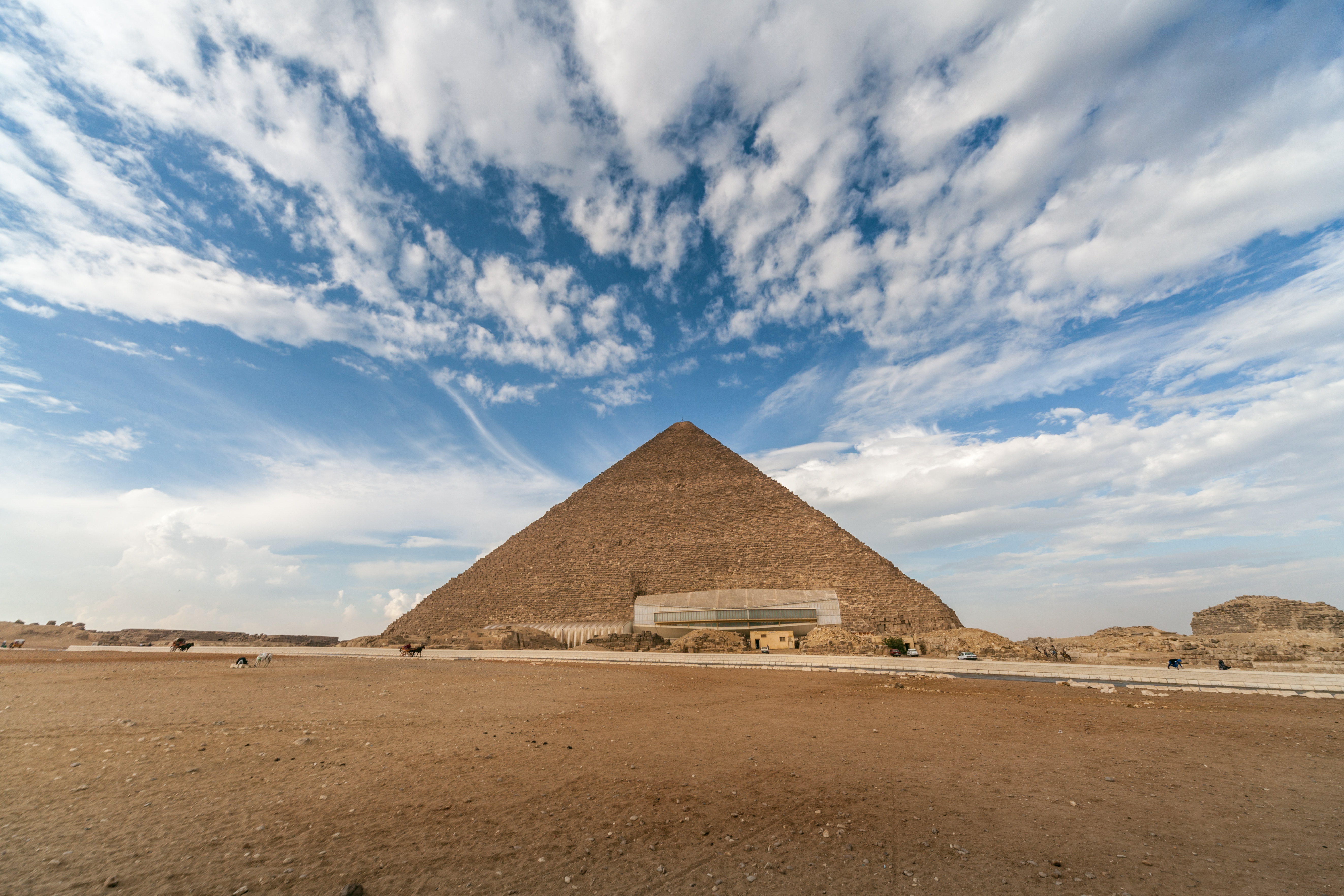 Nazlet El-Semman, Al Haram, Giza Governorate, Egypt